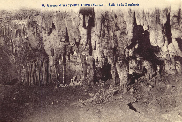 Grottes d'Arcy-sur-Cure, Yonne, France. Dans la Grande grotte, "salle de la Boucherie" - nom (peut-être ancien ?) pour la cavité se situant au tout début de la grande galerie Ouest, immédiatement après la salle de la Vierge. (renseignements tirés de la page 13 du compte-rendu de voyage par le dr Bailly en 1882 (pdf))